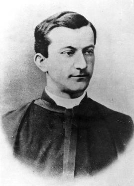 Léon Gustave Dehon (La Capelle, 1843 – Bruxelles, 1925)